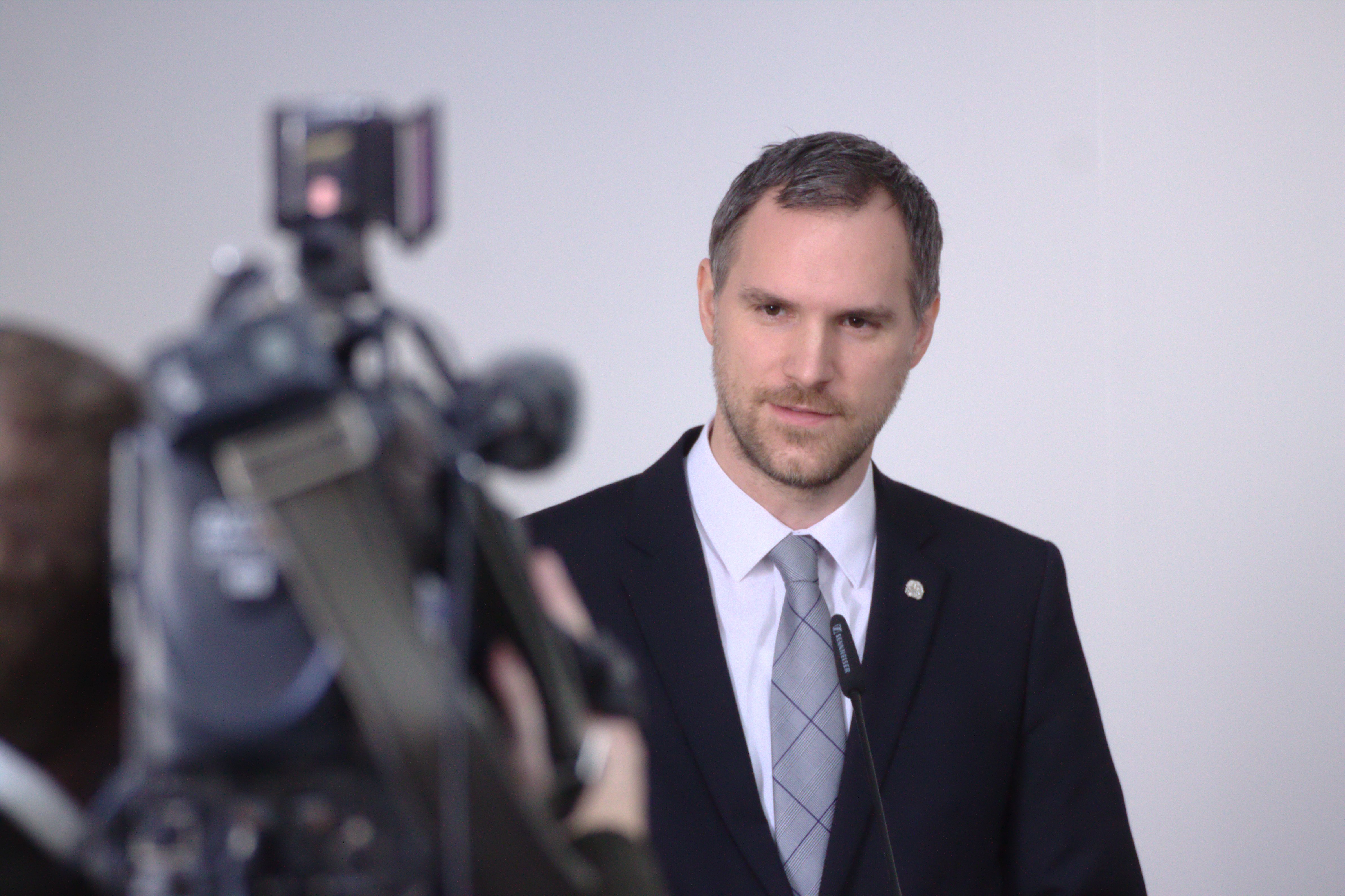 Zdeněk Hřib na tiskové konferenci RHMP Personality rights warningAlthough this work is freely licensed or in the public domain, the person(s) shown may have rights that legally restrict certain re-uses unless those depicted consent to such uses. In these cases, a model release or other evidence of consent could protect you from infringement claims.